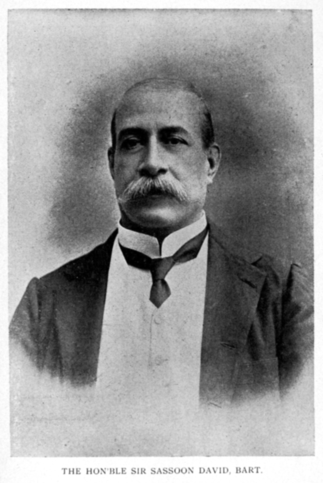 Sir Sassoon David